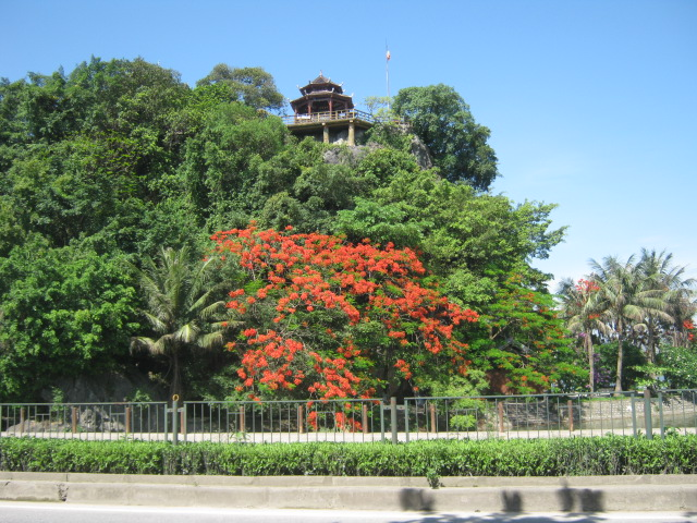 Núi Kỳ Lân - điểm đầu của sông Tràng An thuộc dự án công viên văn hóa Tràng An ở Ninh Bình